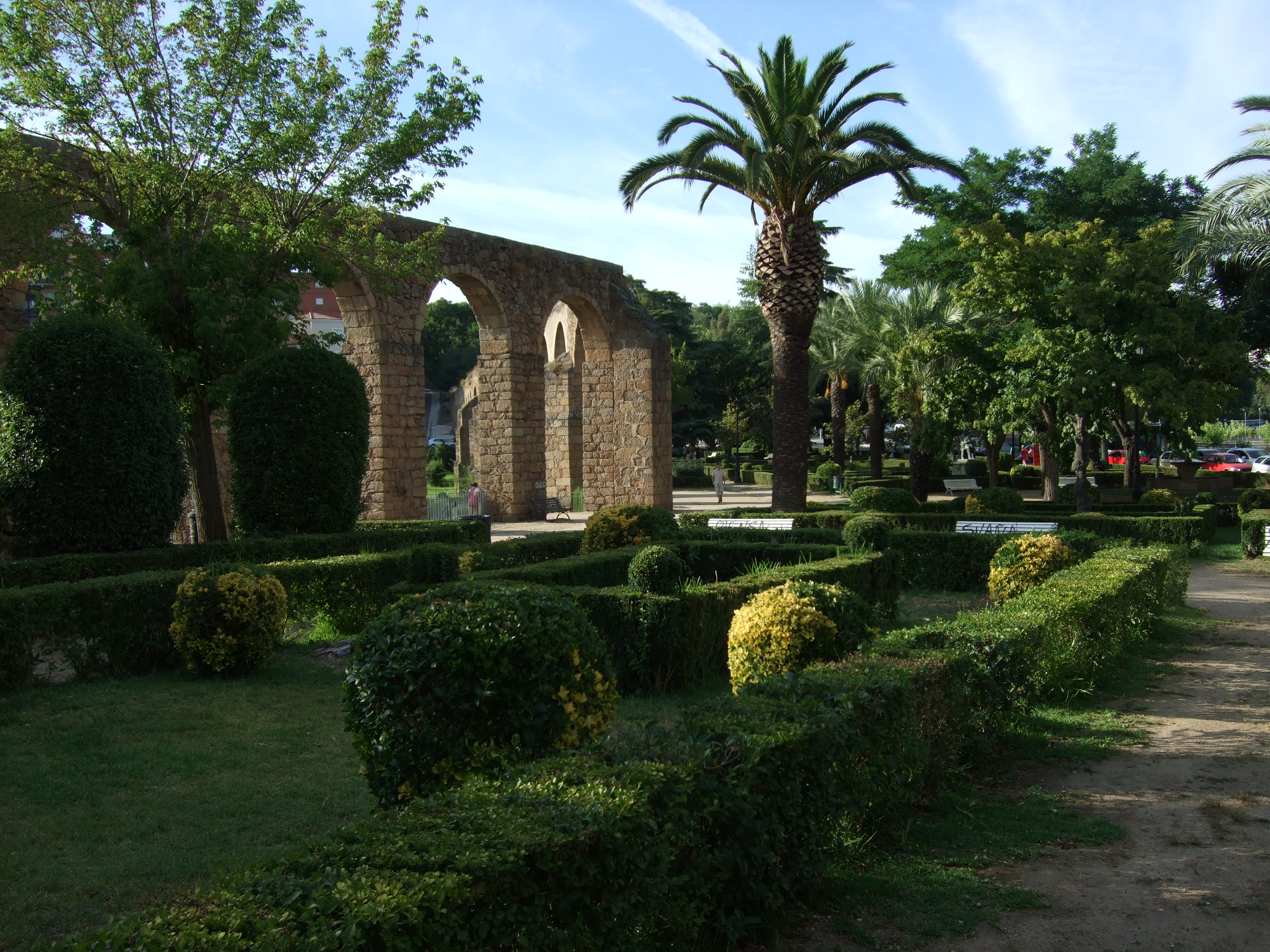 Vista del parque de San Antón, al lado del acueducto en Plasencia, Cáceres